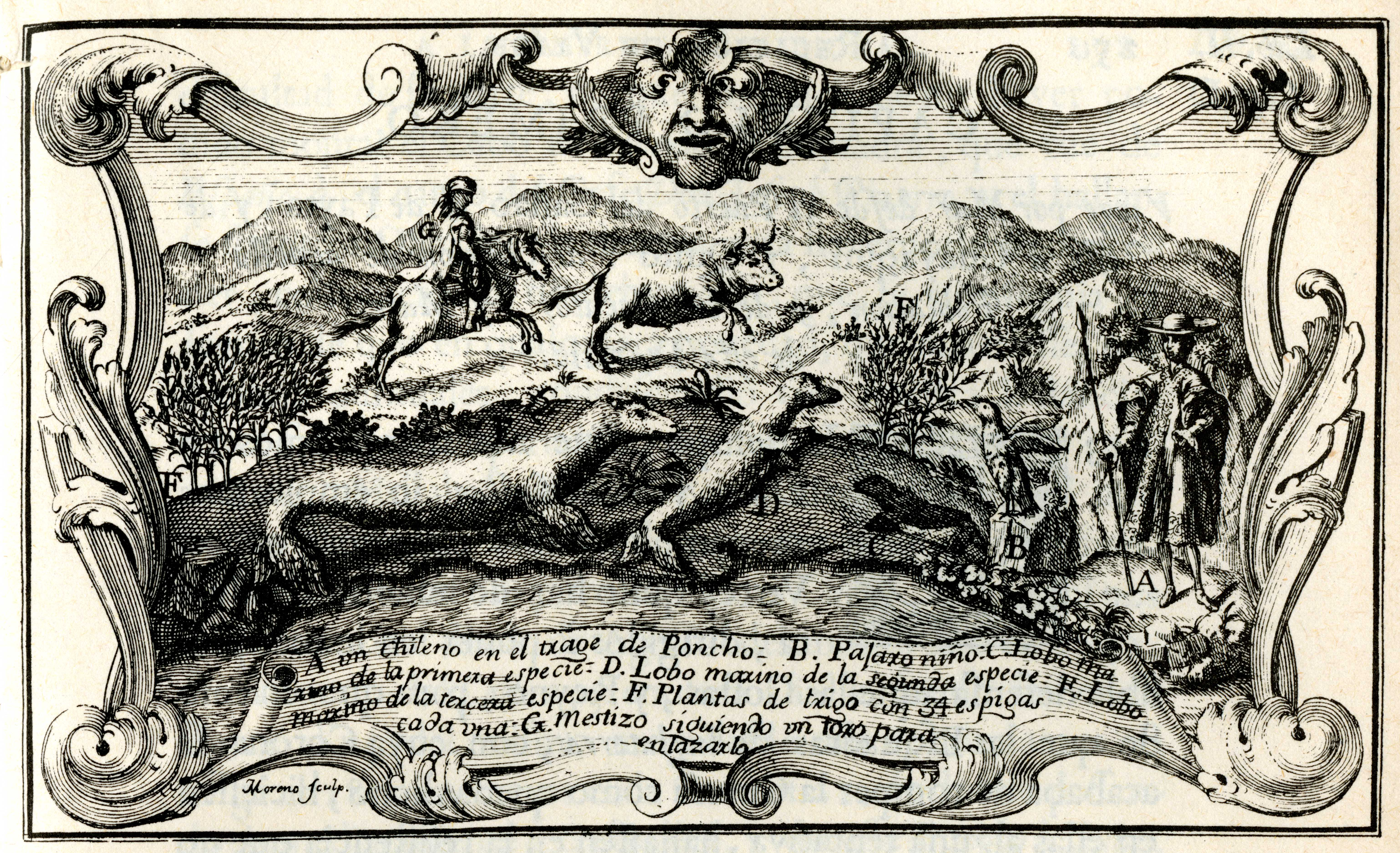 De Ulloa, Antonio y Jorge Juan. Relación Histórica del Viaje a la América Meridional, hecho de Orden de Su Majestad Católica para medir algunos Grados de Meridiano Terrestre, y venir por ellos en conocimiento de la verdadera Figura y Magnitud de la Tierra, con otras varias Observaciones Astronómicas y Físicas. Por Don Jorge Juan Comendador de Aliaga, en la Orden de San Juan, Socio correspondiente de la Real Academia de las Ciencias de París y Don Antonio de Ulloa de la Real Sociedad de Londres: ambos Capitanes de Fragata de la Real Armada. Segunda Parte / Tomo II. Impresa por la Orden del Rey Nuestro Señor en Madrid por Antonio Marín, Año de MCDDXLVIII (1748). Diapositiva de Consulta y acceso publico cuya información fue investigada de un libro y/o ejemplar de revisión custodiado en los Fondos Bibliográficos (Sección Siglo XVIII o Etapa Colonial) del Archivo Histórico del Guayas; Guayaquil, Ecuador